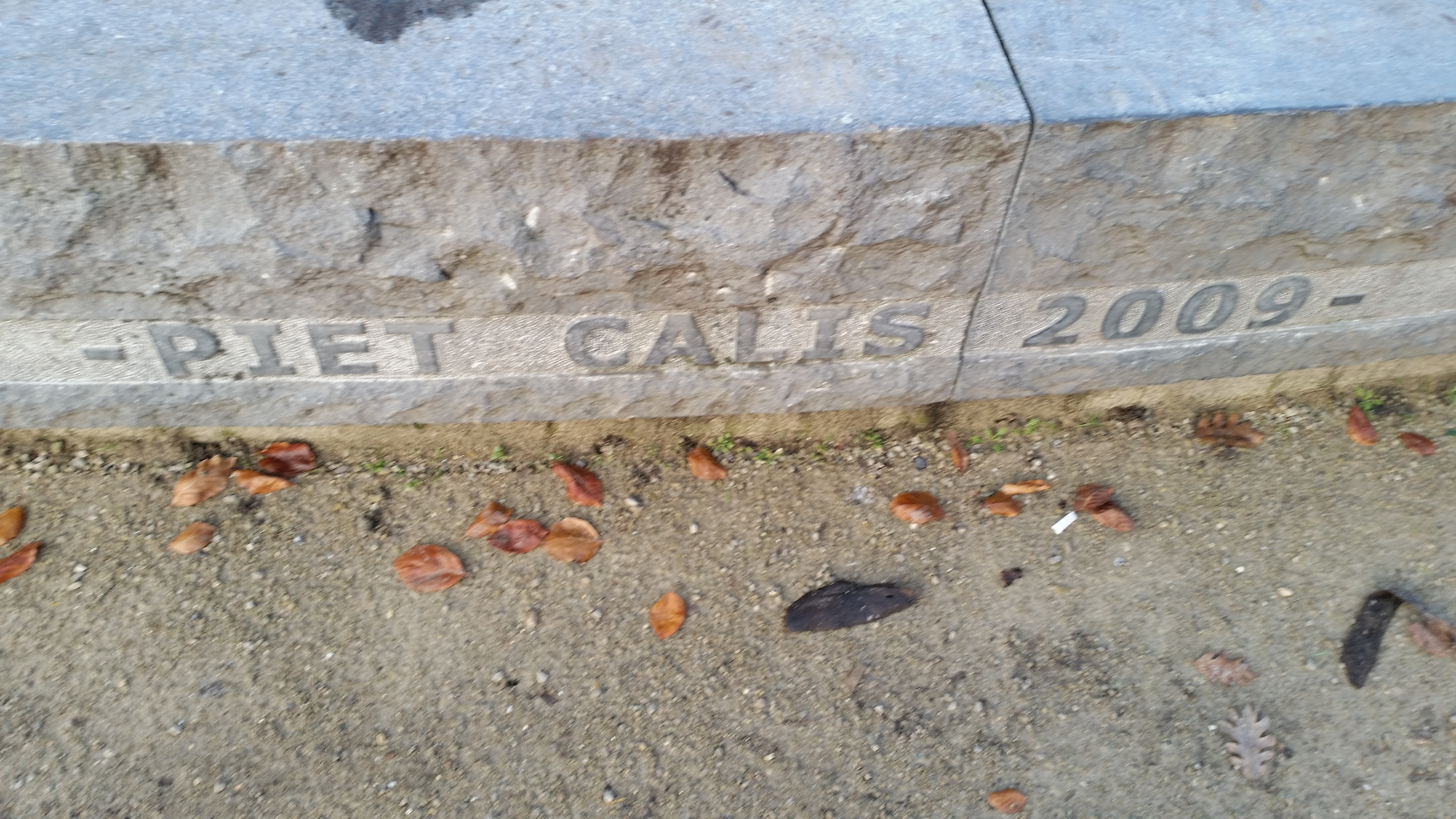 Vondelbeeld "Piet Calis, 2009"